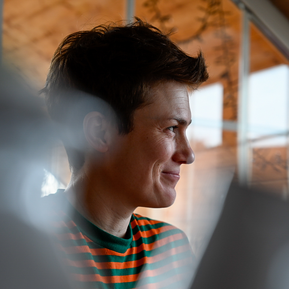 Simon Rolls Foto von Katharina Vötter